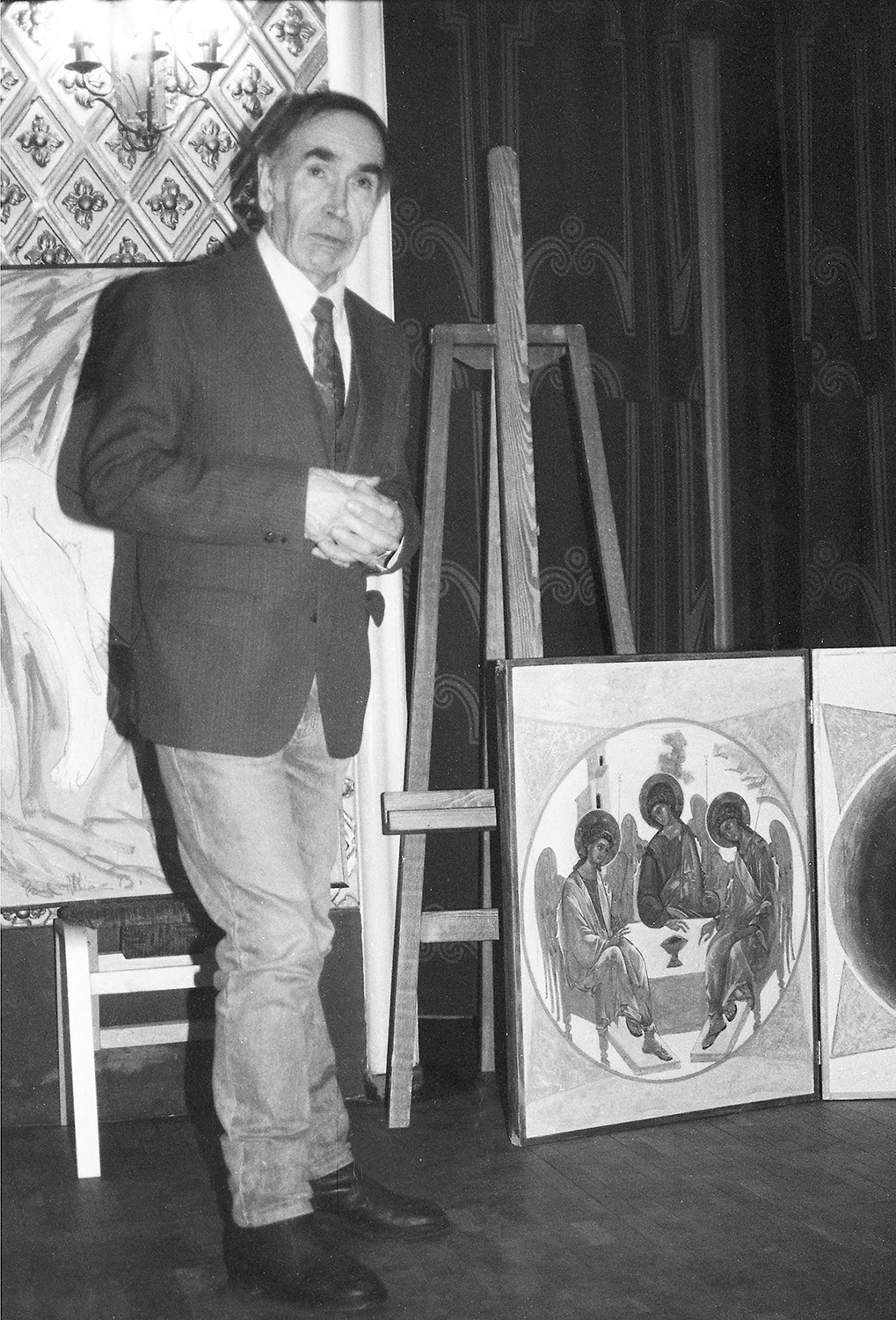 Nikolai Kormašov, maalikunstnik 94